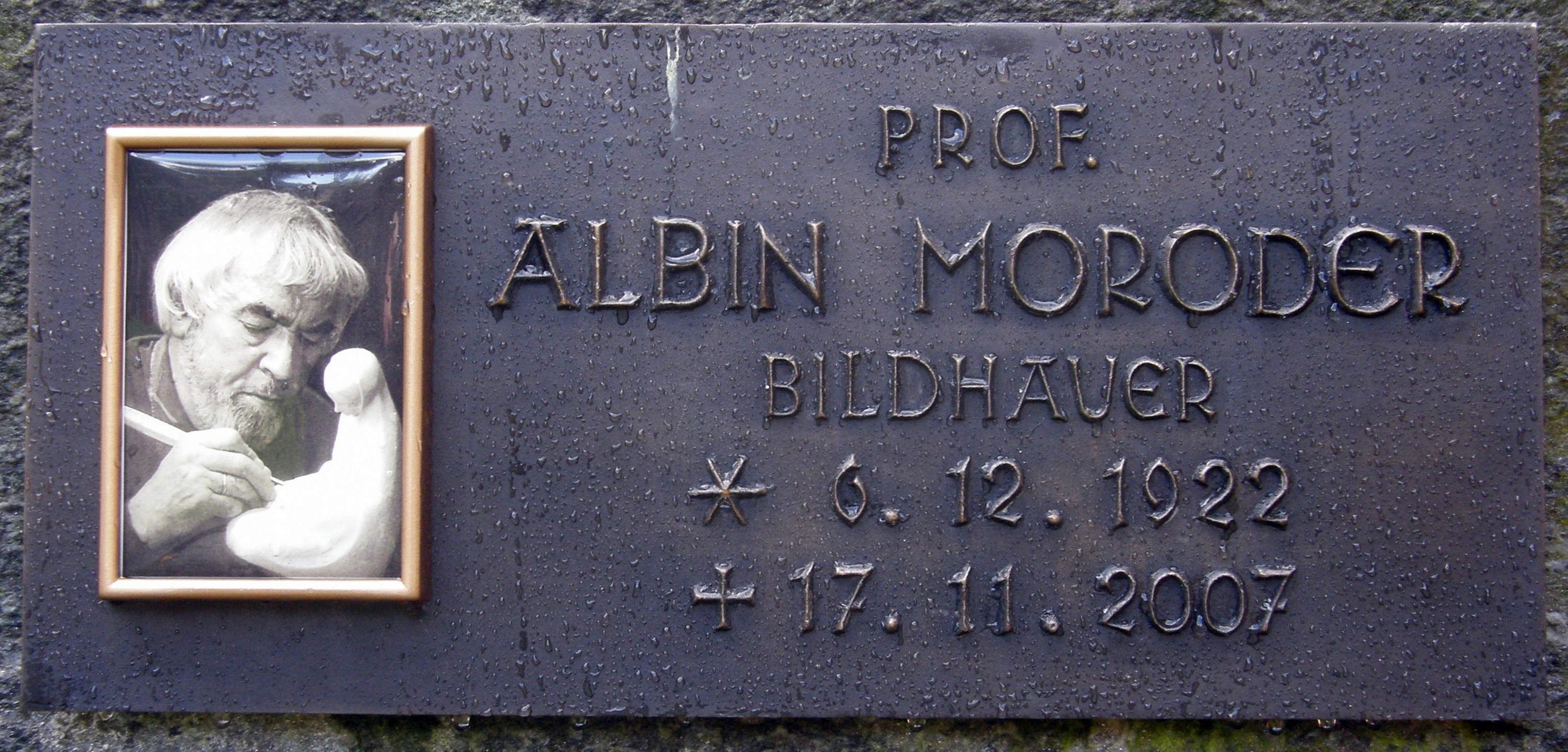 Grabplatte von Albin Moroder auf dem Waldfriedhof Mayrhofen (Tirol, Österreich)